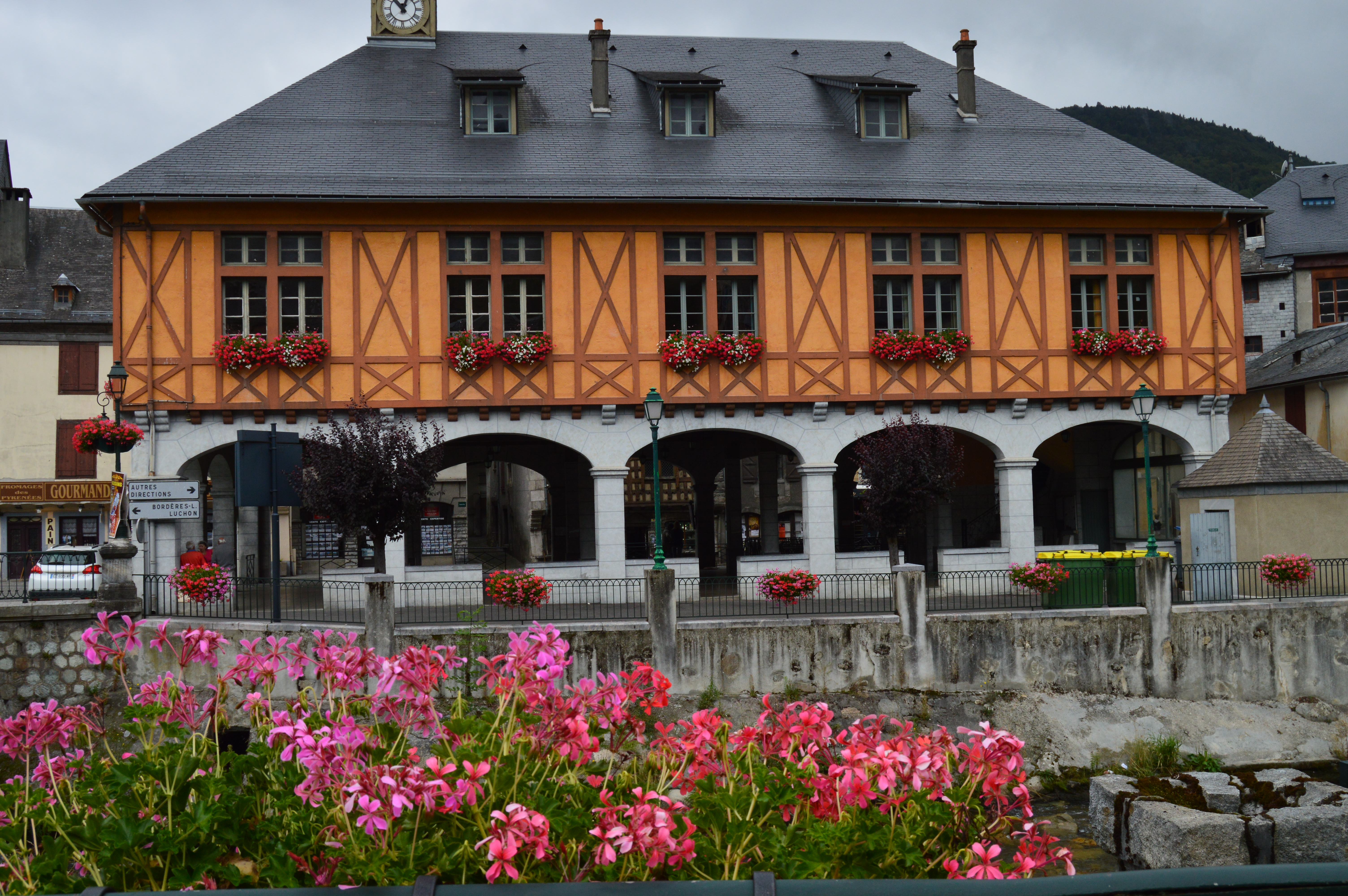 Arreu- Hotel de Ville